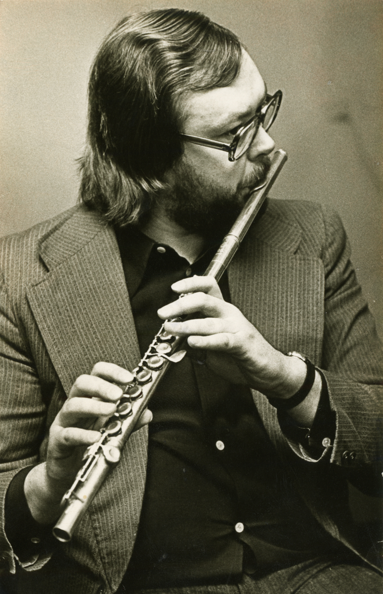 Vanemuise flötist Jüri Hargel, märts 1979